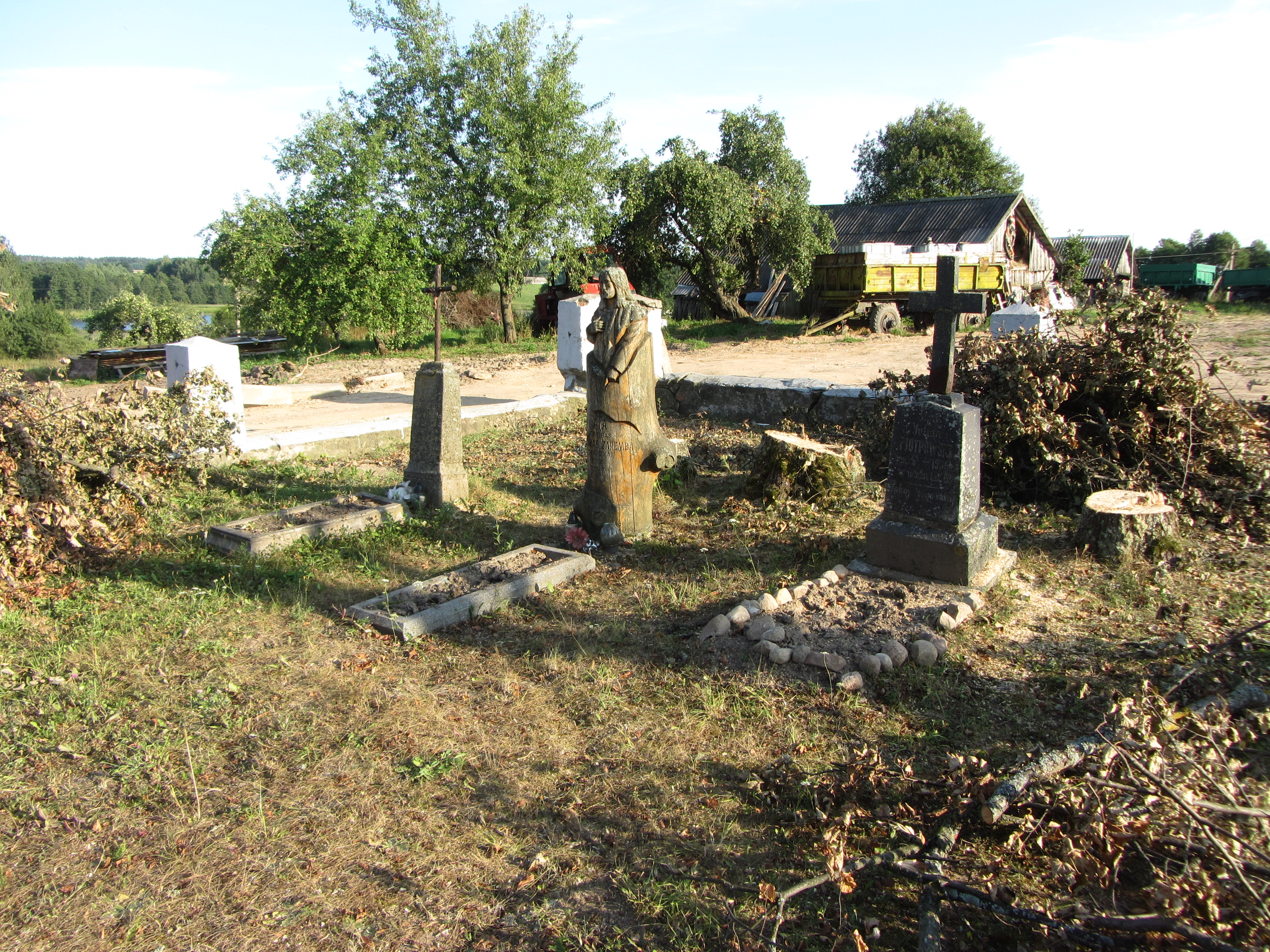 Grigiškė 30292, Lithuania